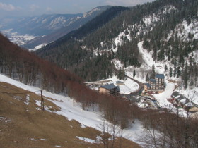 versant nord vu du col naturel - Col de Rousset - Drome